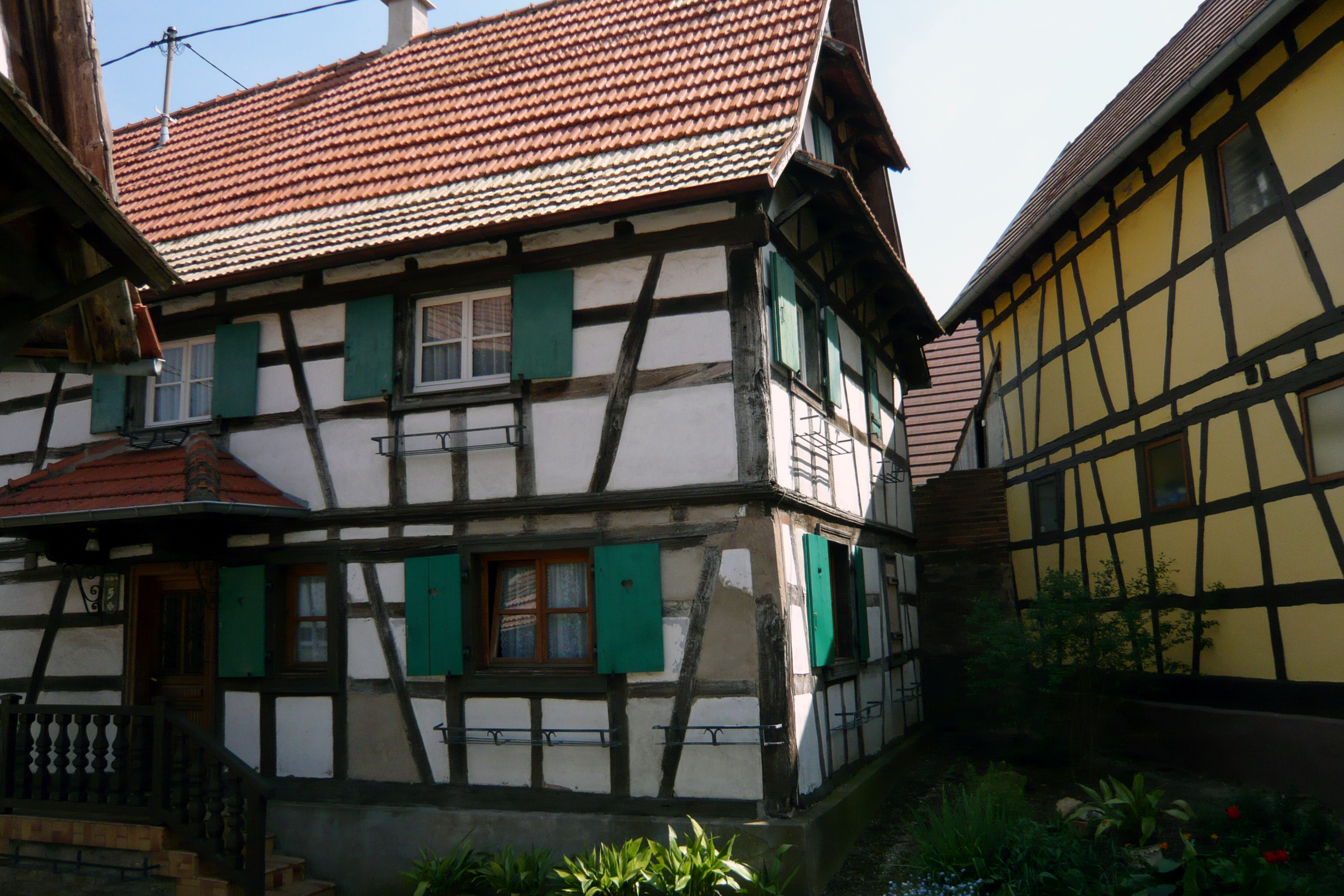 Fachwerkhaus in Waltenheim-sur-Zorn; Ferme; Rural House